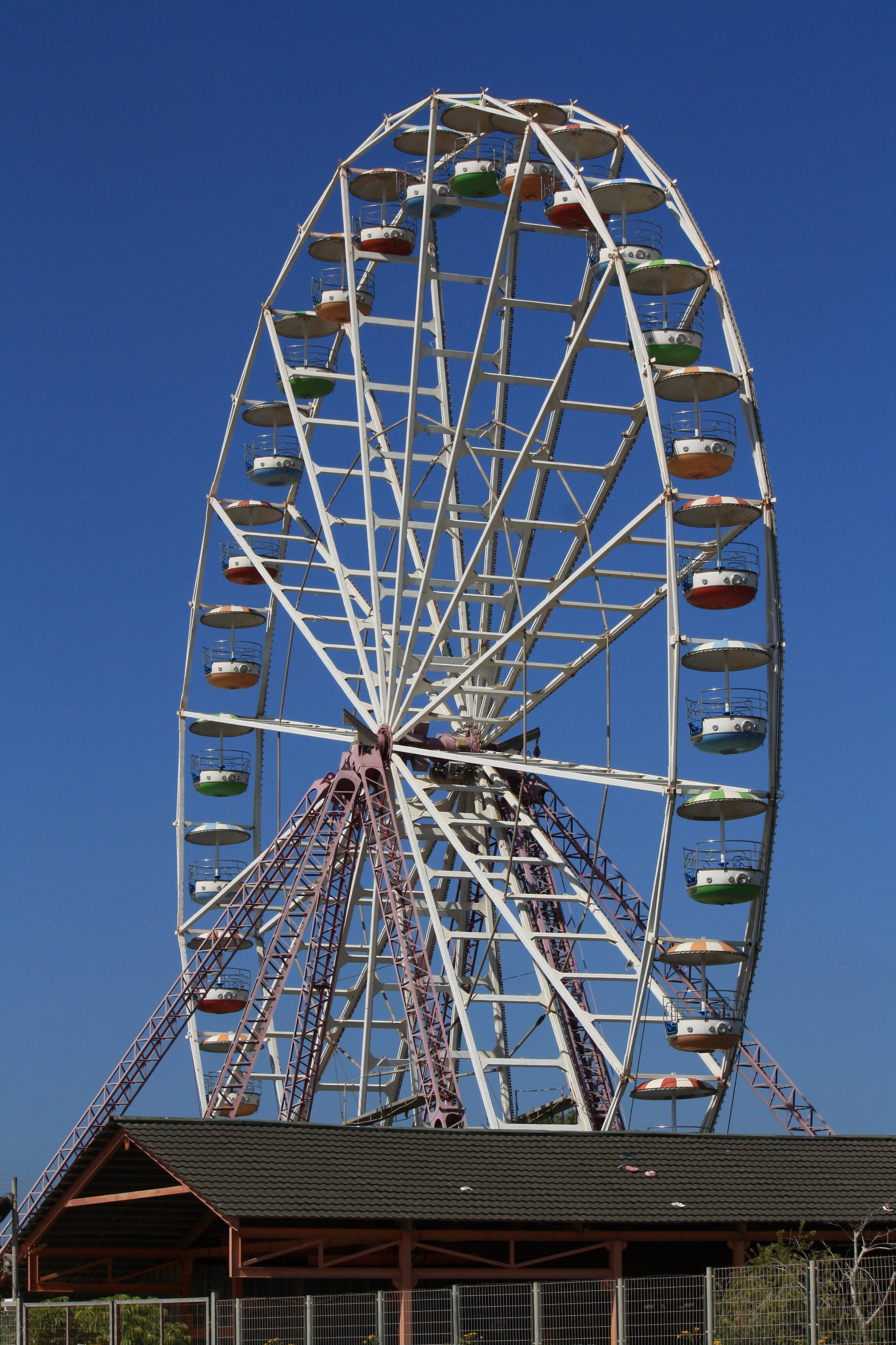 גלגל הענק שבפארק השעשועים סופרלנד, ראשון לציון.